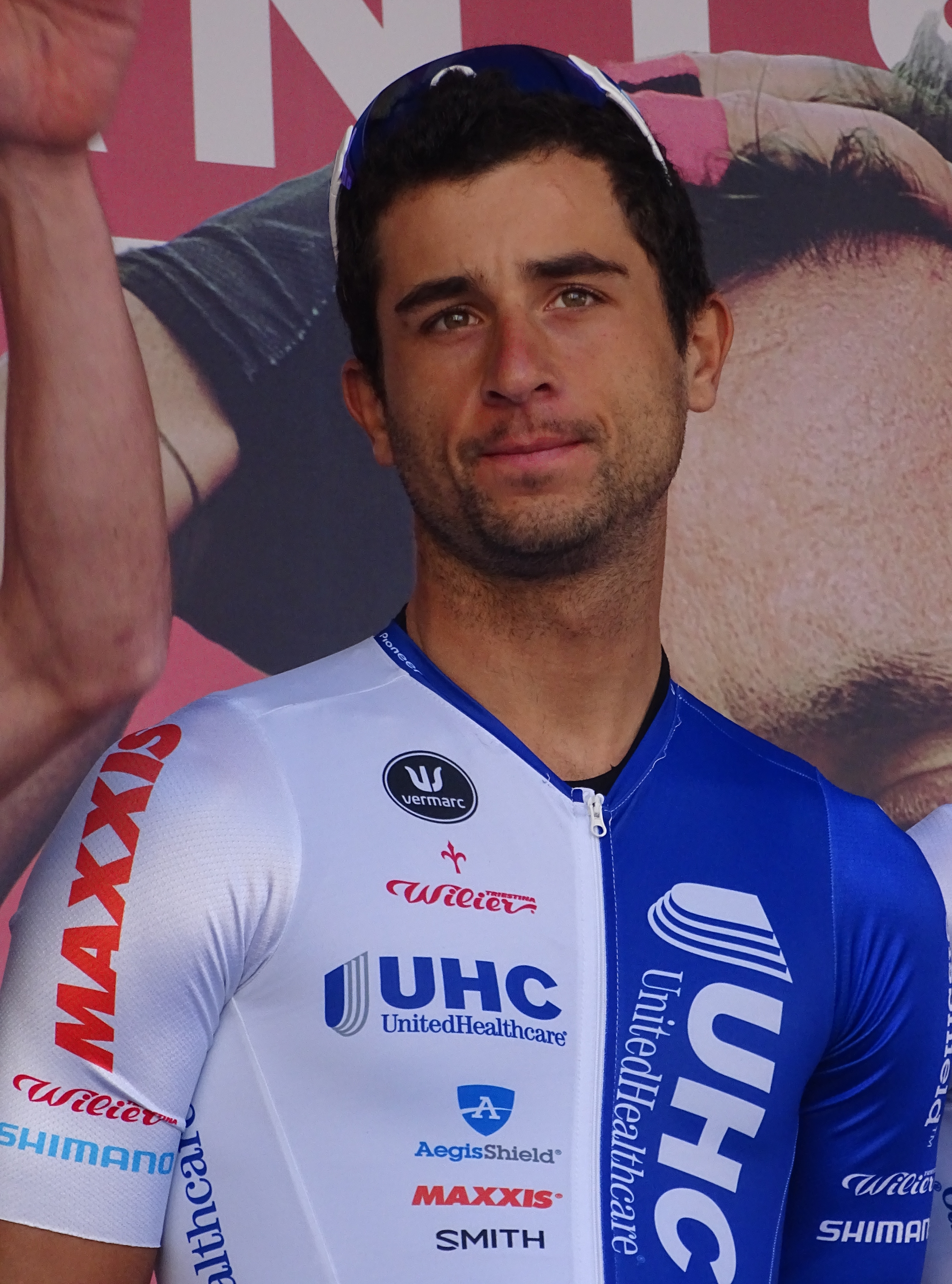 Reportage réalisé le mercredi 15 avril à l'occasion du départ de la Flèche brabançonne 2015 à Louvain, Belgique.